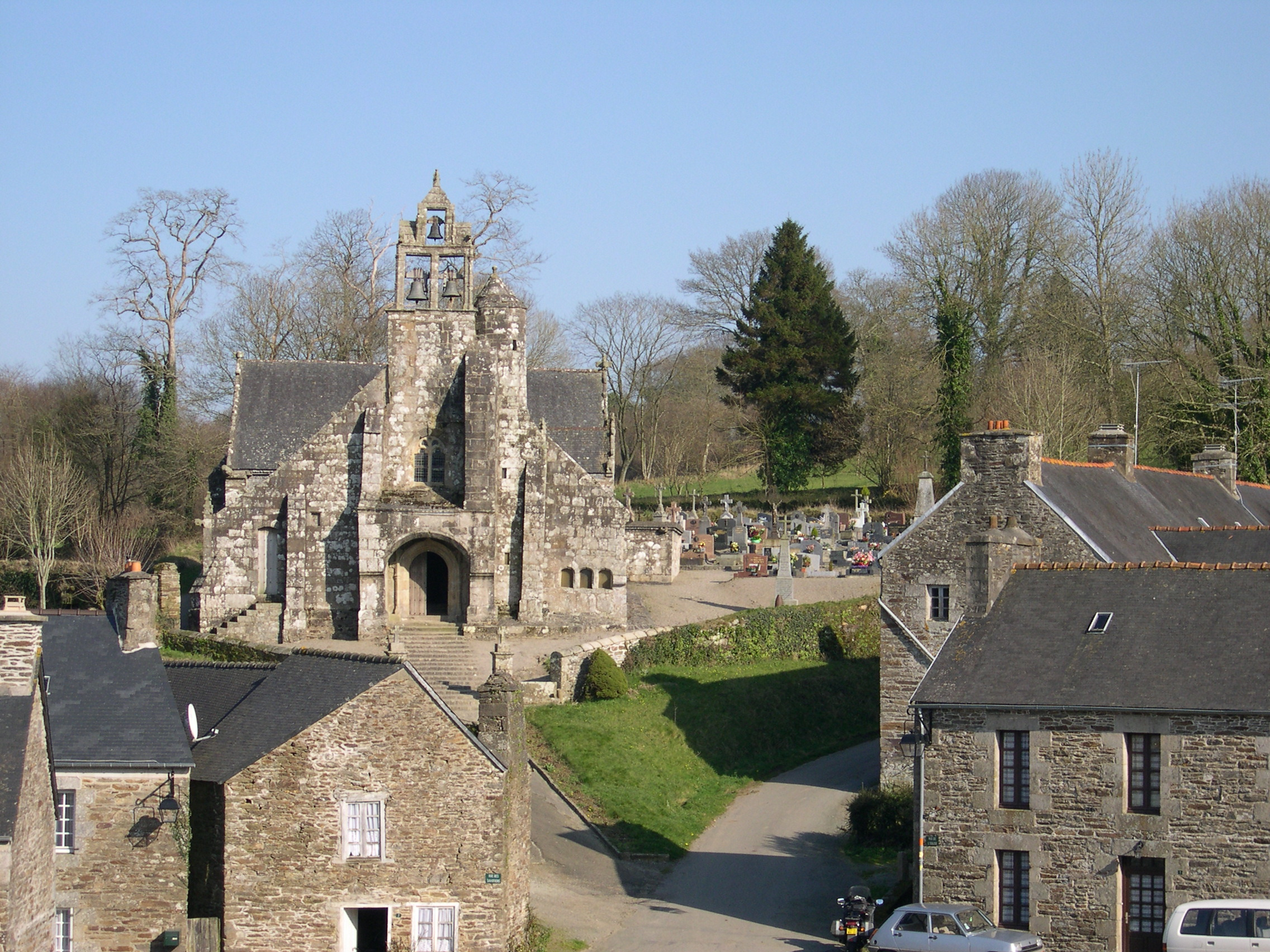 Église Saint-Envel - Loc-Envel - Côtes d'Armor - France - Mérimée PA00089307 .